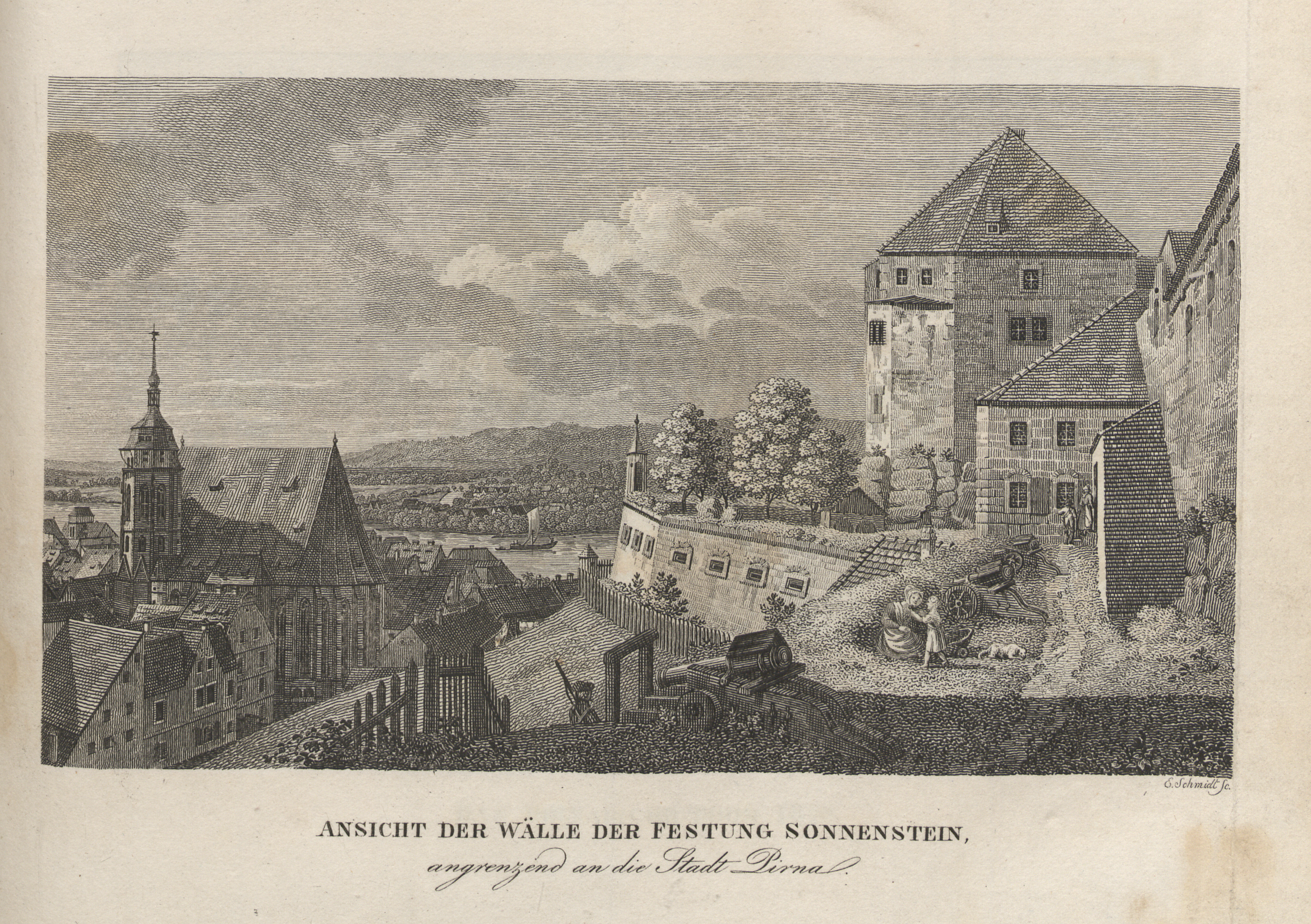 siehe Bildbeschreibung aus: Abbildungen von Dresdens alten und neuen Pracht-Gebäuden, Volks- und Hof-Festen. Untertitel: Kupferheft zur Chronik der Kgl. Sächs. Residenz-Stadt Dresden und des Sammlers für Geschichte und Alterthum, Kunst und Natur im Elbthale. Grimmer, Dresden 1835